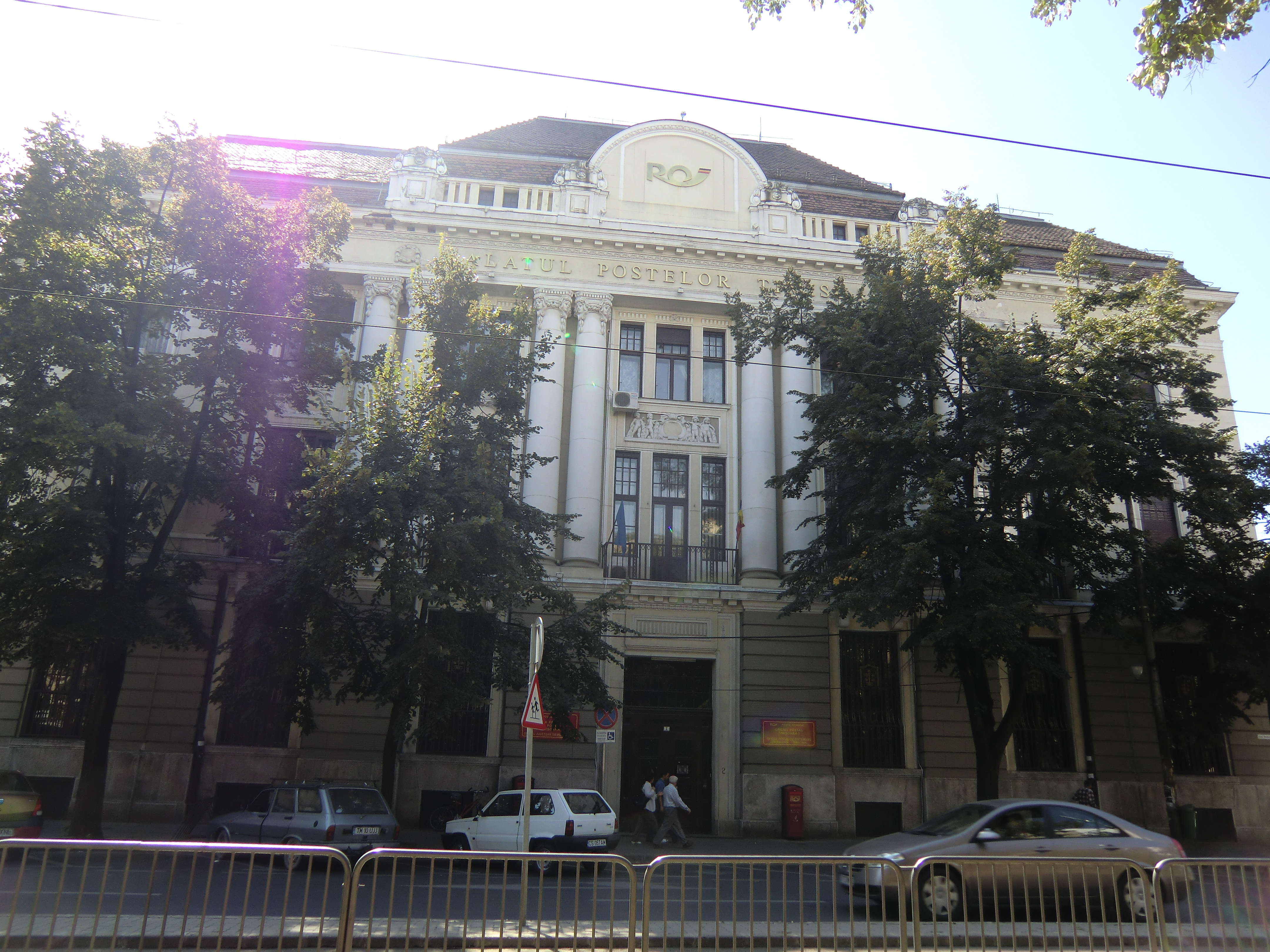 Postpalais